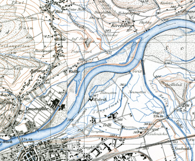 Darstellung des Kraftwerk der Zementfabrik Zurlinden & Co. im Rüchlig und des Kraftwerks der Chocolat Freqy A.G auf der Siegfriedkarte. Datenstand 1913